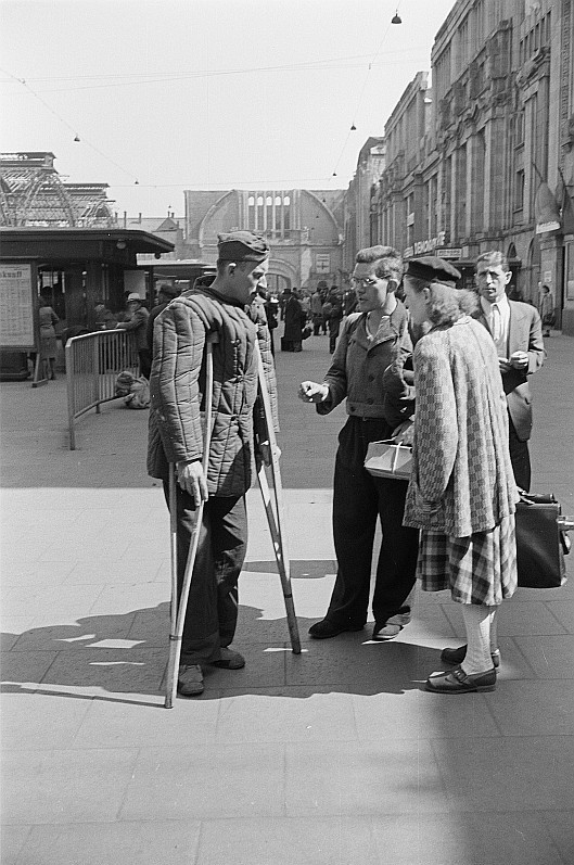 Original image description from the Deutsche FotothekRenate Rössing im Gespräch mit Heimkehrern